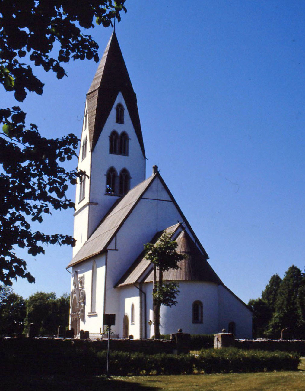 Stånga kyrka